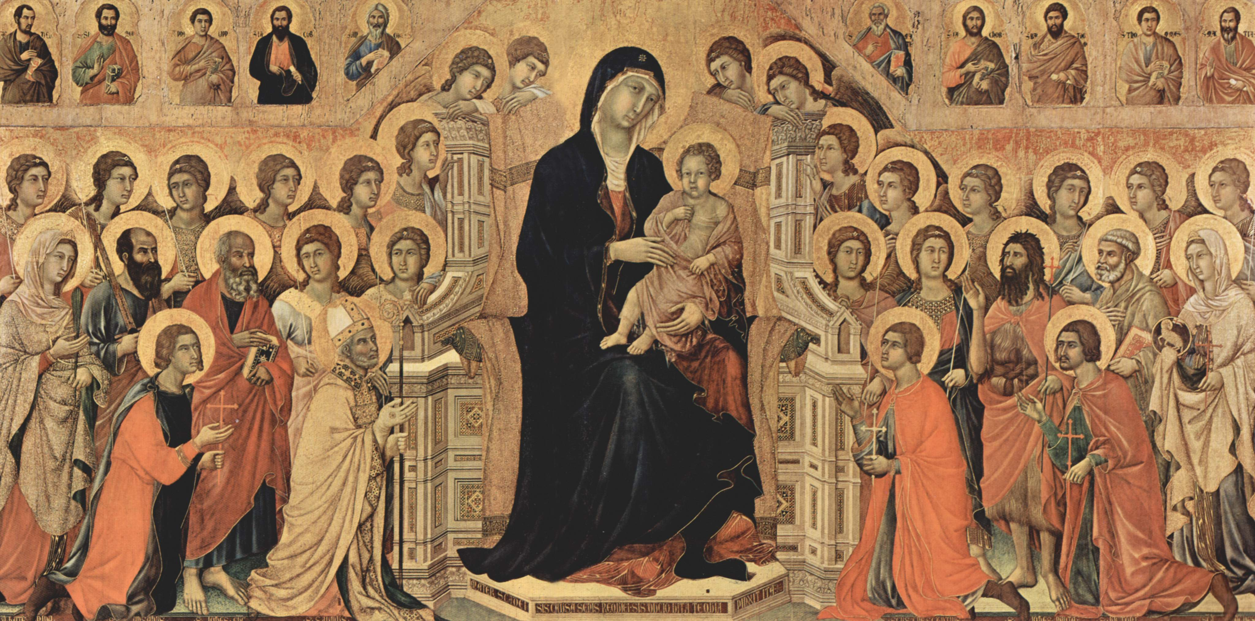 Altarretabel des Sieneser Doms, Vorderseite, Haupttafel, Szene: Thronende Maria mit Kind, Engeln, Heiligen und Apostelfiguren in Arkaden